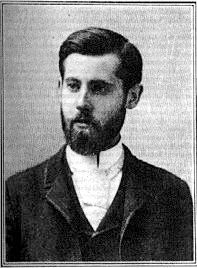 Thaddeus Cahill, photo fin du XIXe siècle ou début XXe, auteur inconnu, domaine public d'après la période